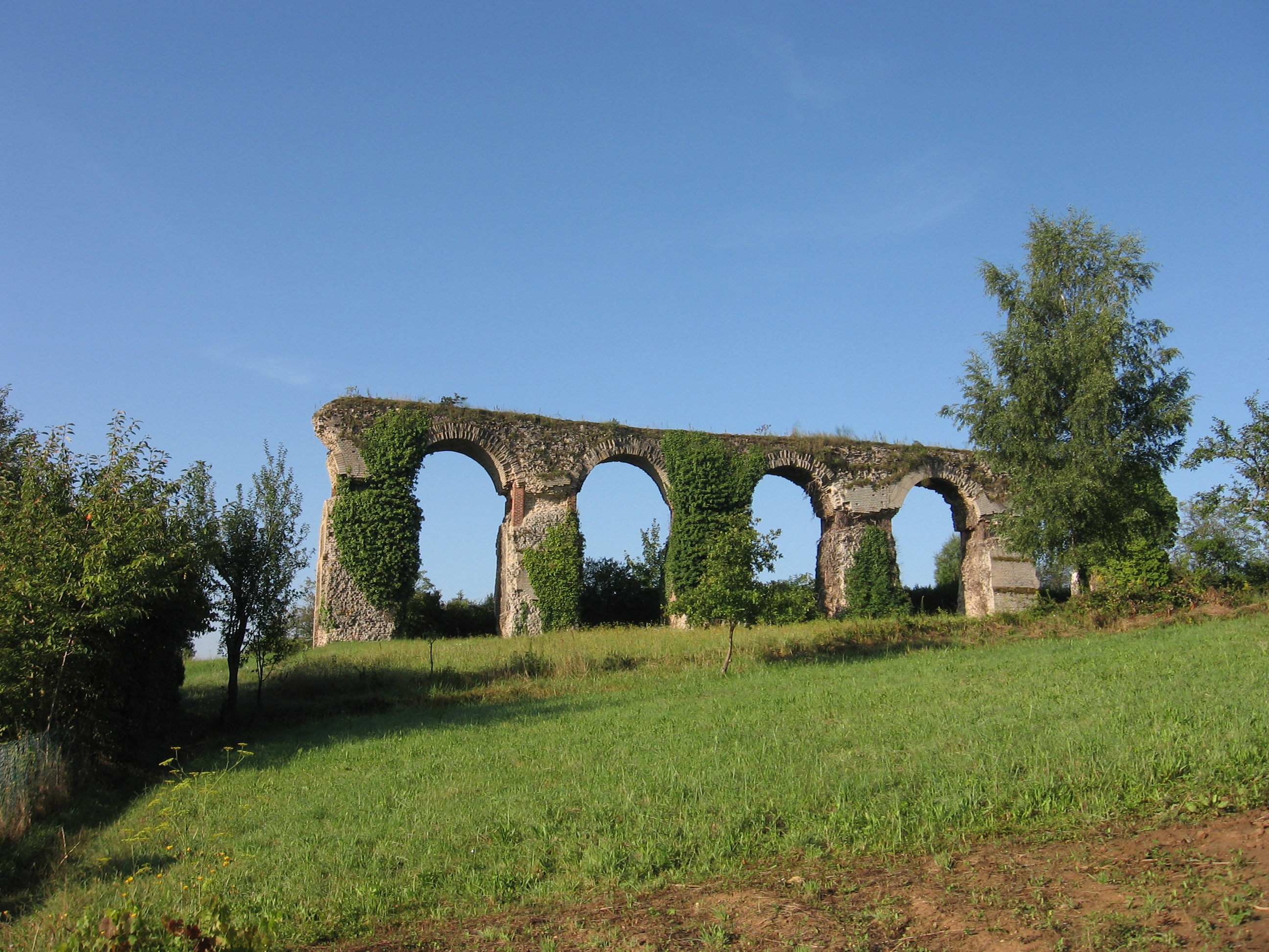 Roman aqueduct at Ars-sur-Moselle